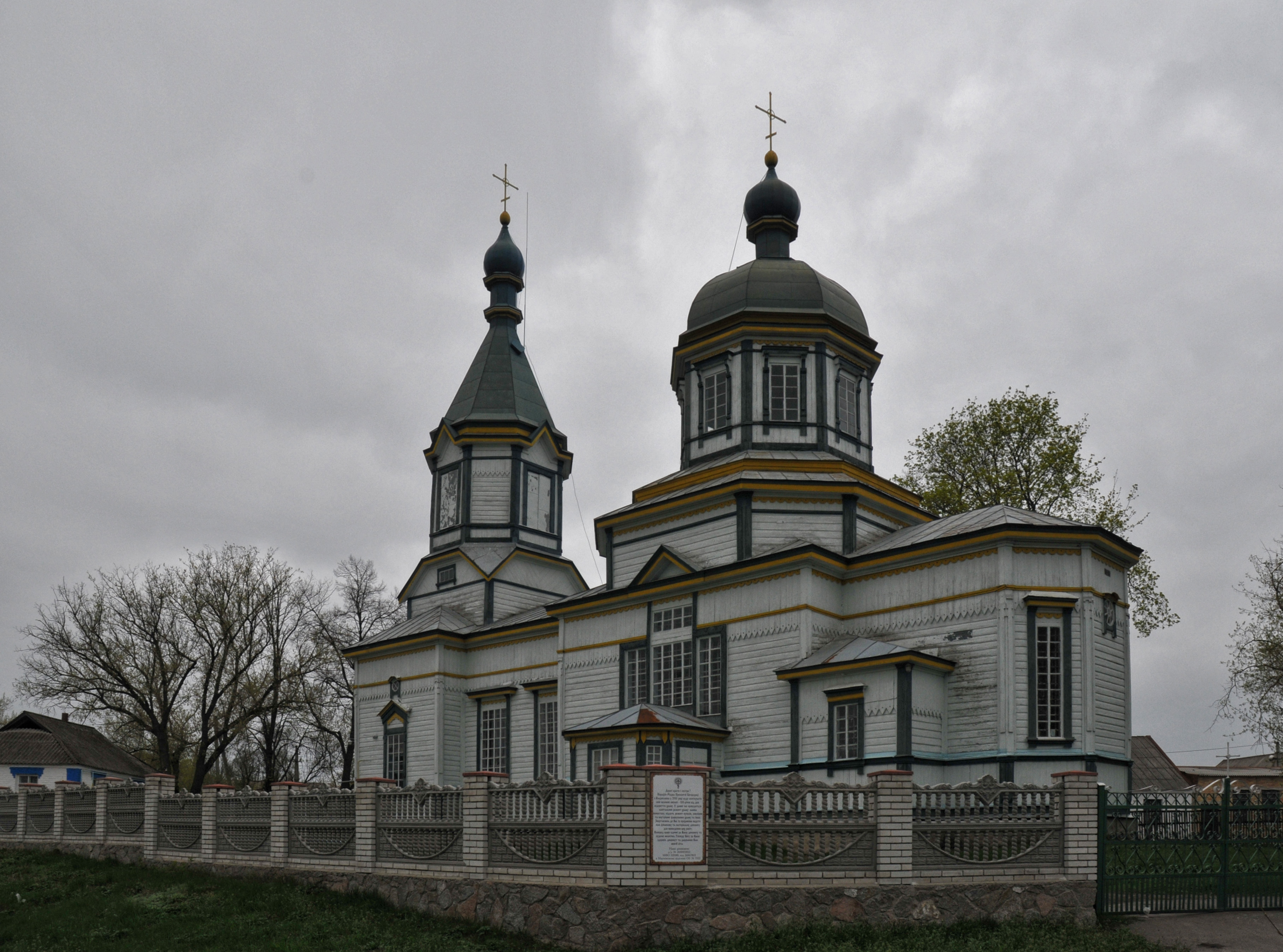 Владиславка, церква Різдва Богородиці